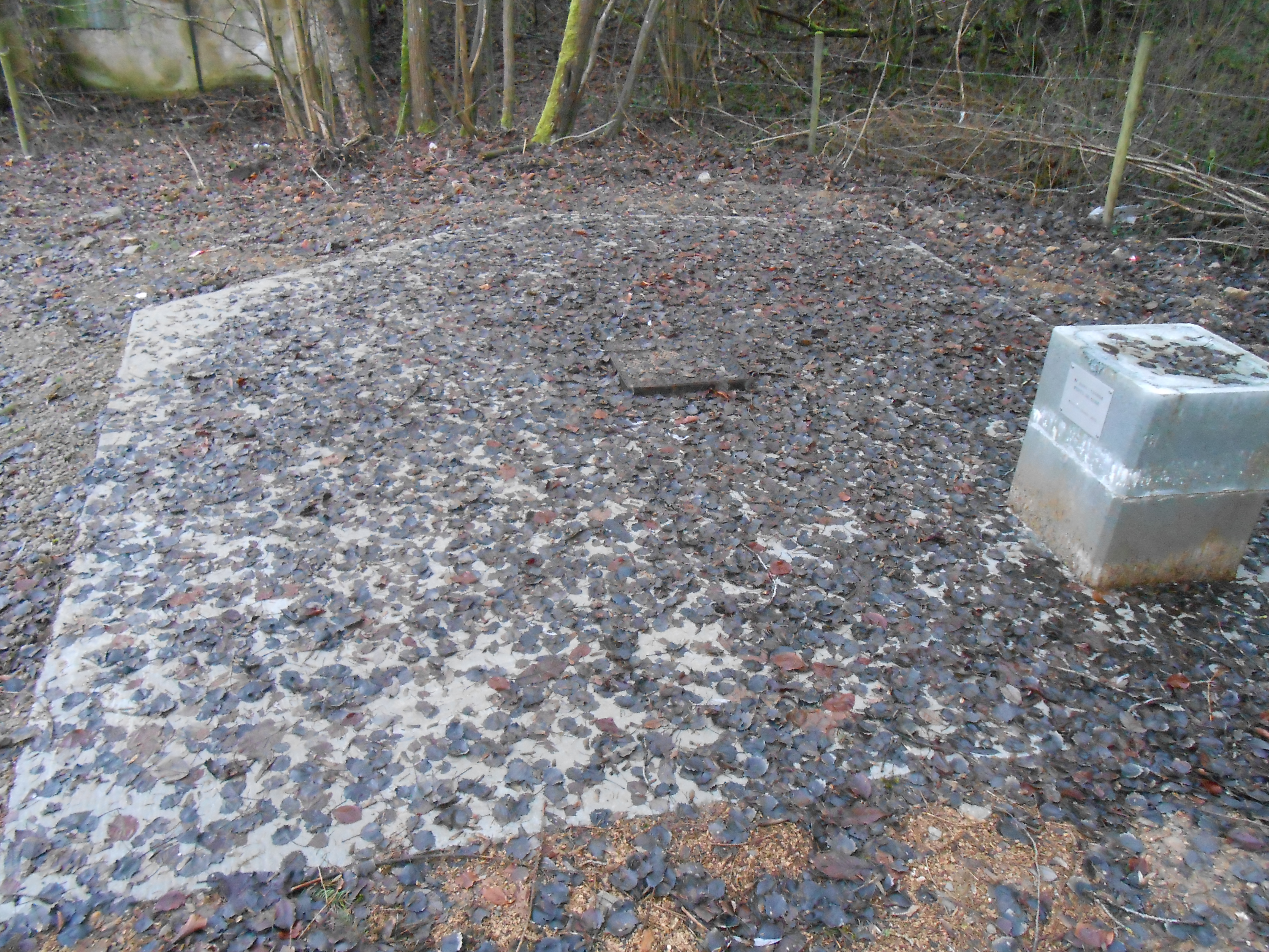 Ancien puits de mine à Vezin, remblayé en 2013.